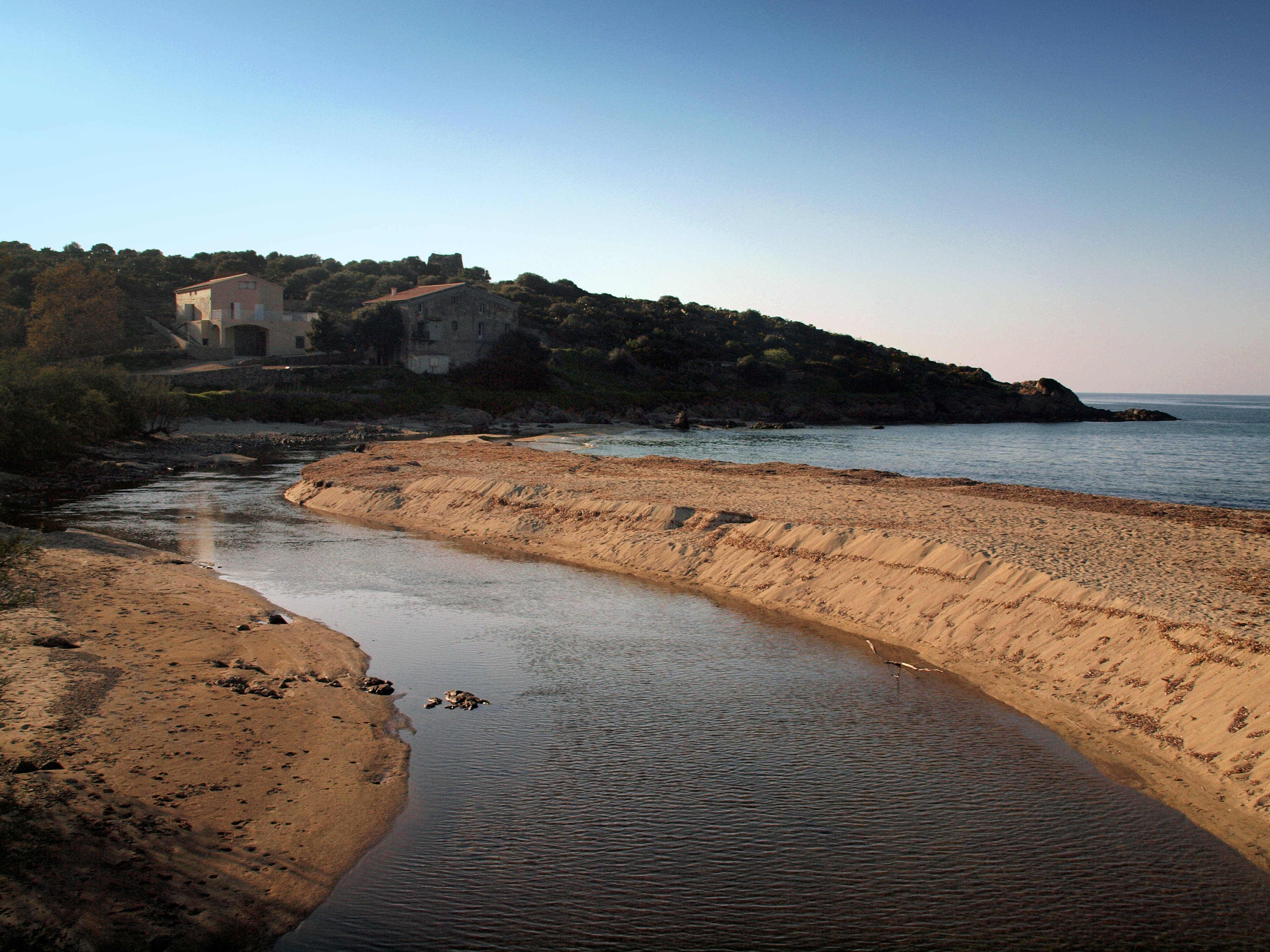 Belgodère (Corse) - Embouchure du Regino à Lozari